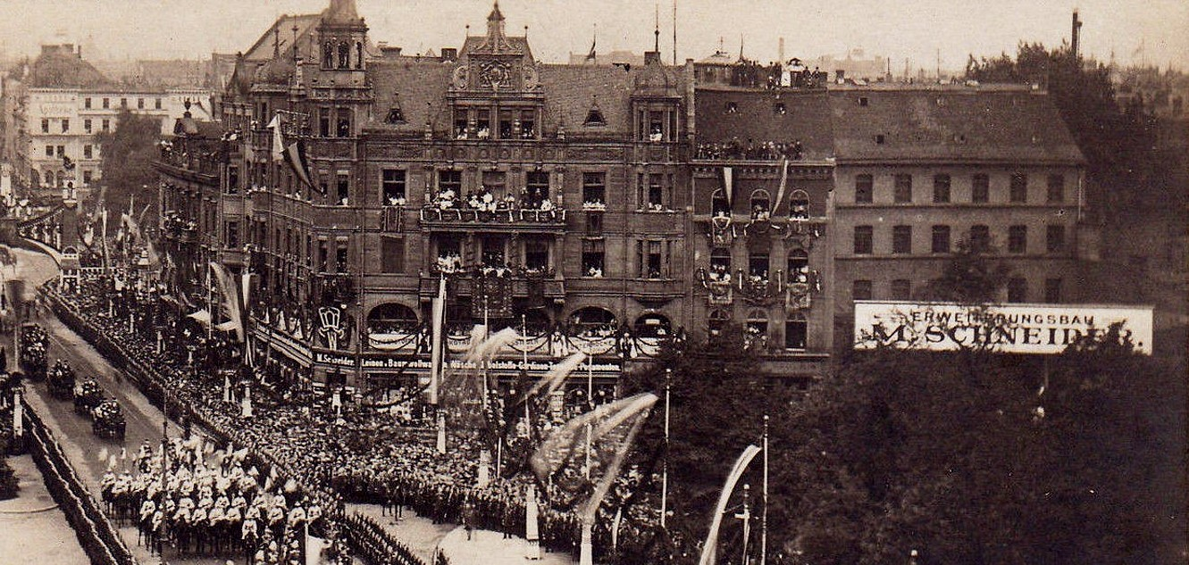 Kaufhaus Martin Schneider (obecnie Dom Handlowy Podwale) we Wrocławiu, na rogu ulic Świdnicka i Podwale, 1906, Wjazd cesarza. Wrocławskie Dni Cesarskie